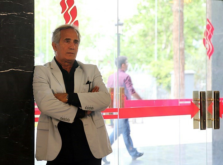 مجید مظفری، اختتامیه جشنواره بین‌المللی فیلم فجر - اردیبهشت ۱۳۹۵